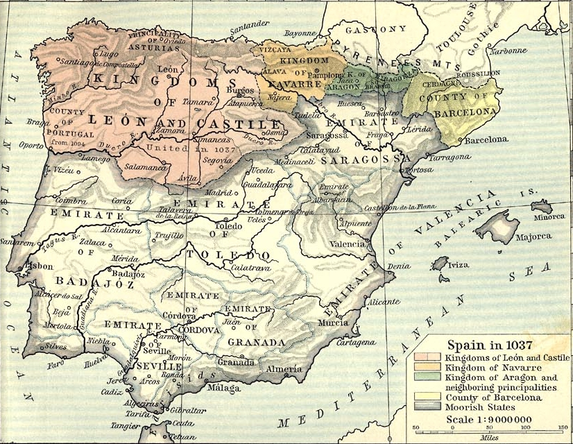 España en 1037